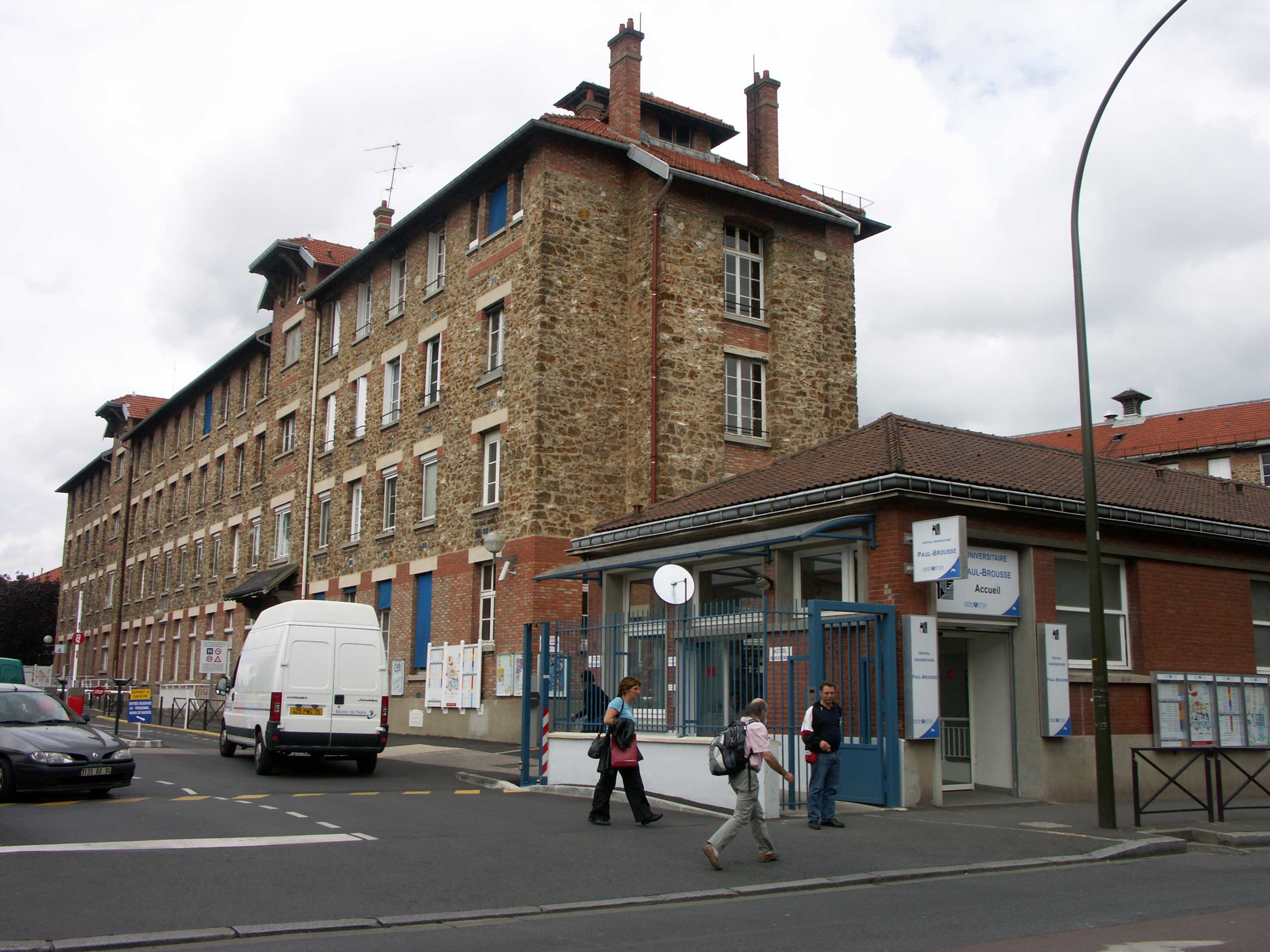 Hopital Paul Brousse - Villejuif - Entrée principale